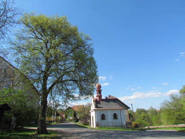 Střední část obce Soběslavice s kaplí sv. Jana Nepomuckého a Lípou svobody